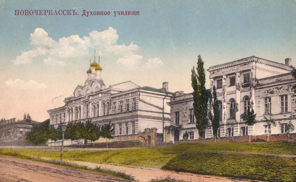 Новочеркасск (до 07.11.1917). Духовное училище и находящееся рядом с ним уездное училище.